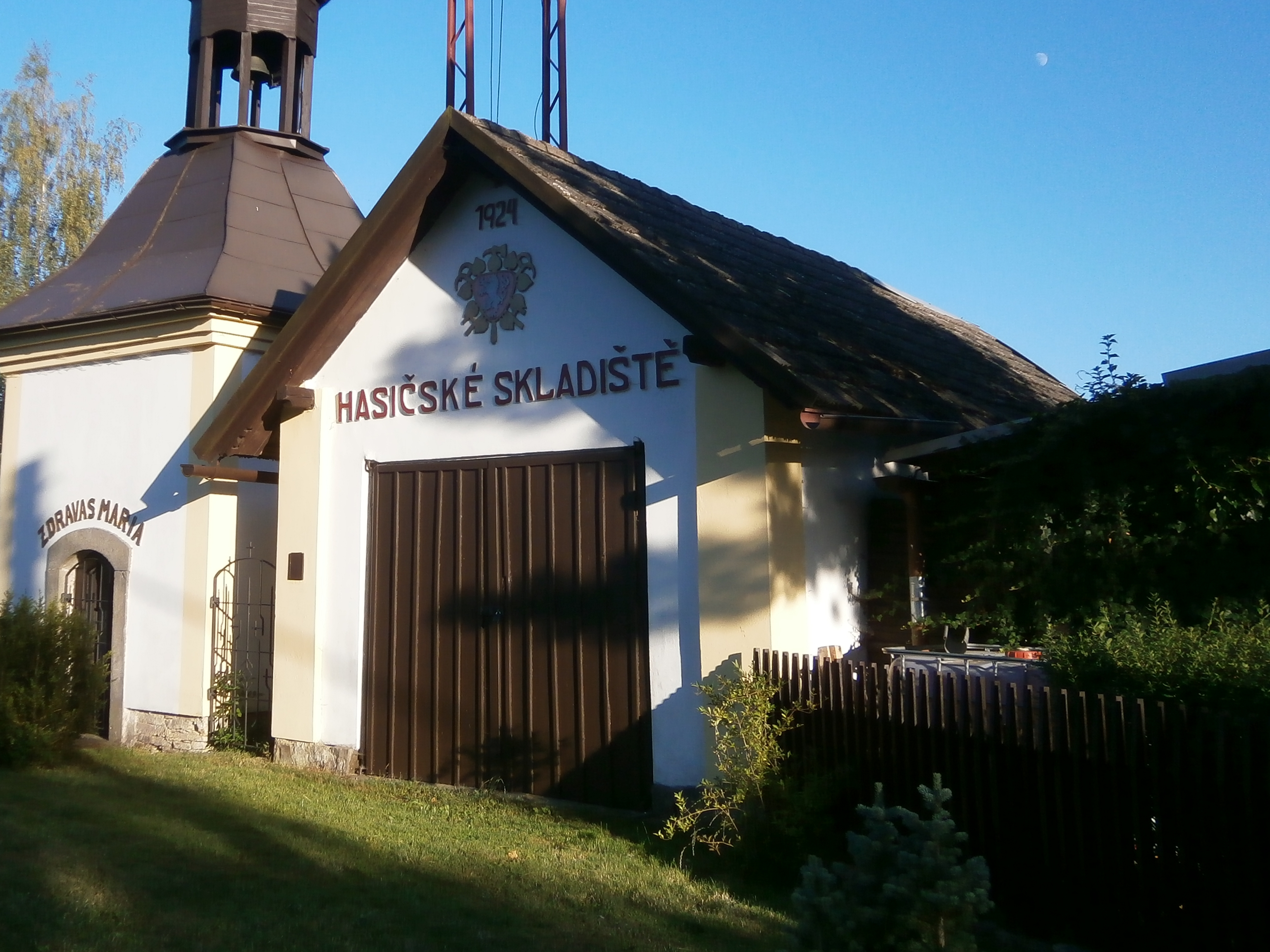 Hasdičská zbrojnice v Křižanově (Hořičky)